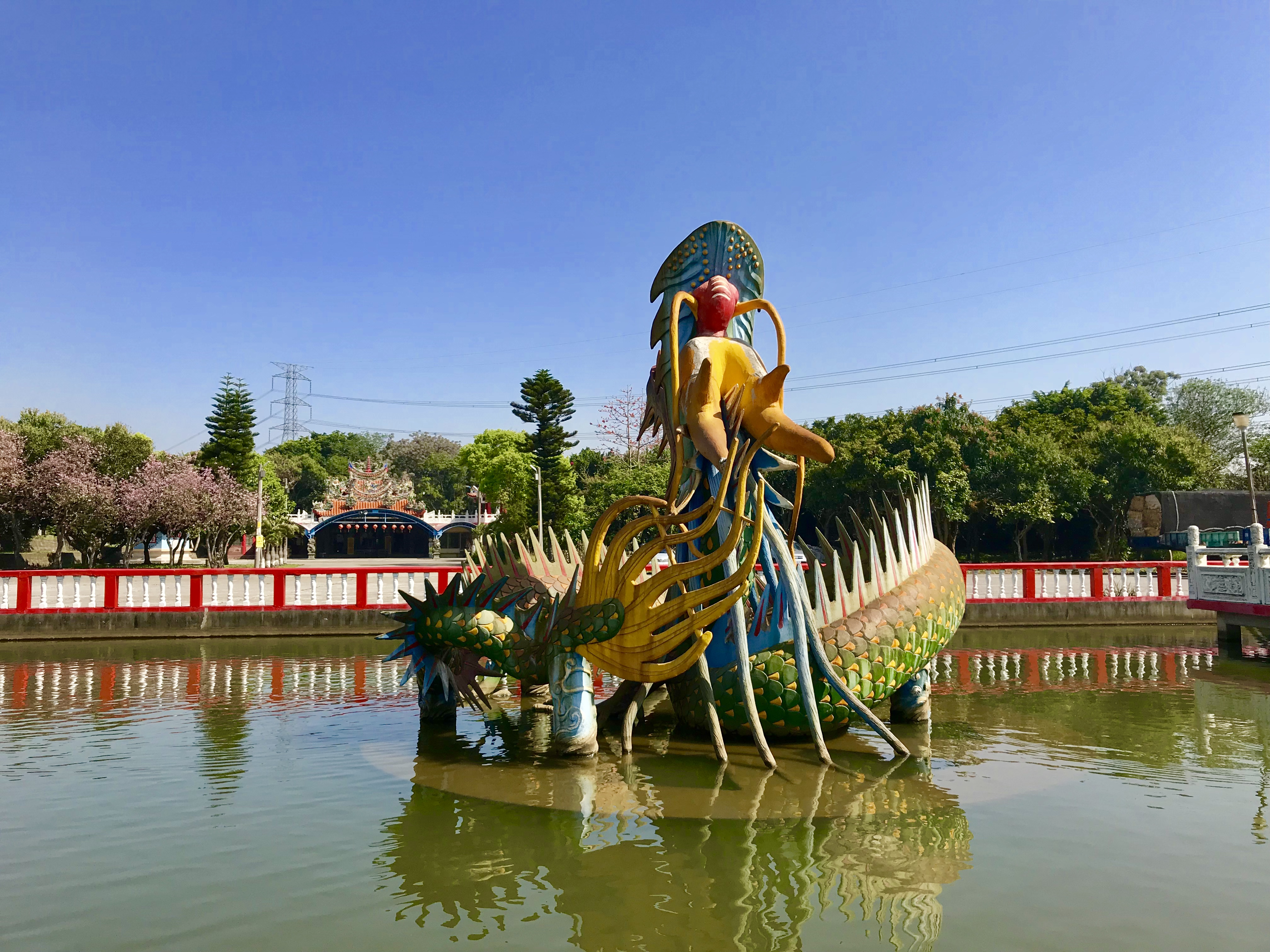 伸慶宮水池